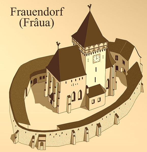 SEPIA Biserica fortificata din Axente Sever.